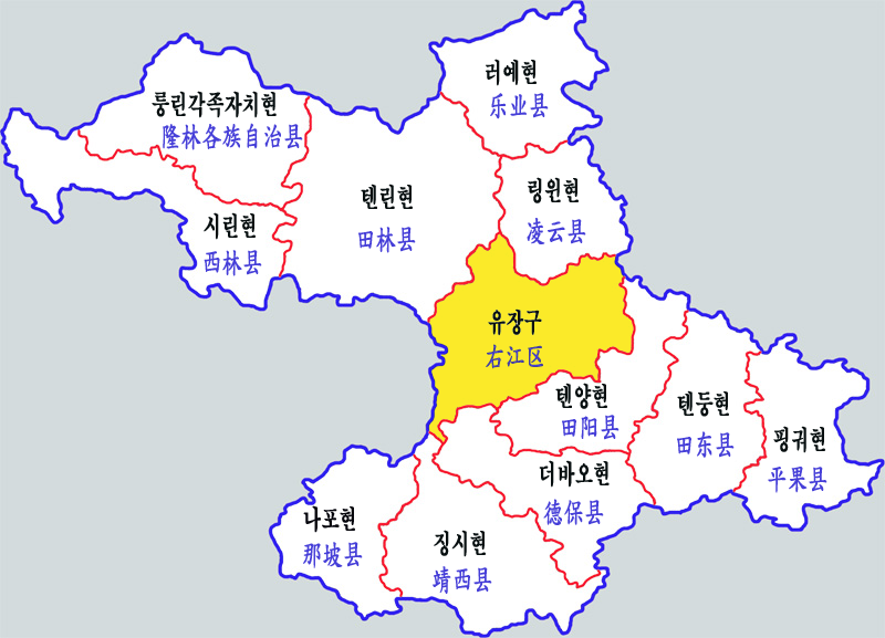 바이서시 현급구역도